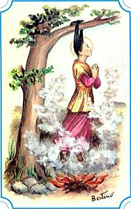 Immagine devozionale (santino), opera di Alberto Boccali (Bertino) raffigurante Santa Zoe, martire a Roma nel 286.